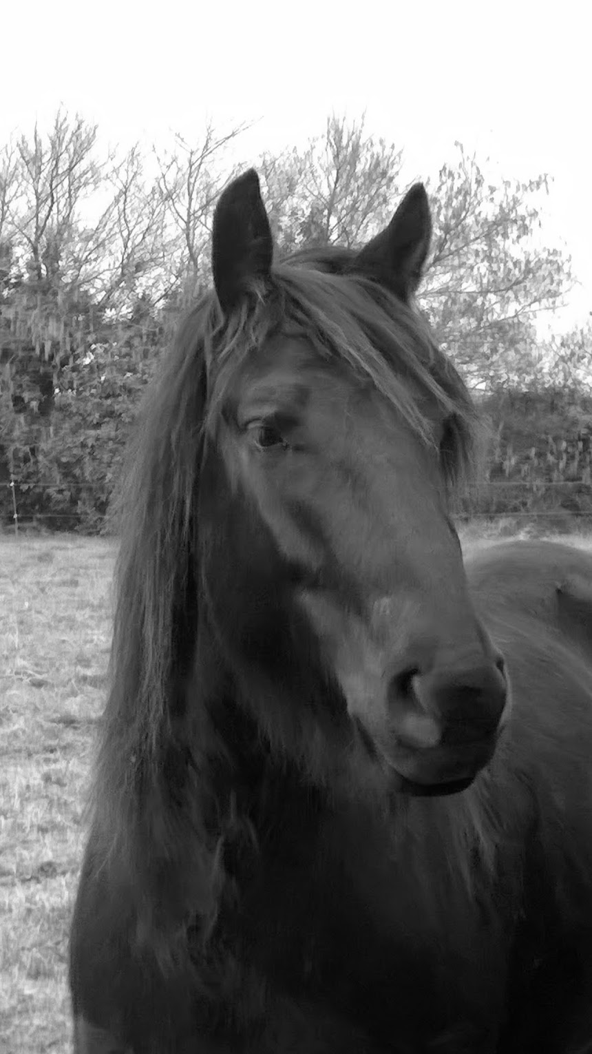 Photographie noir et blanc du profil d'un cheval de Mérens